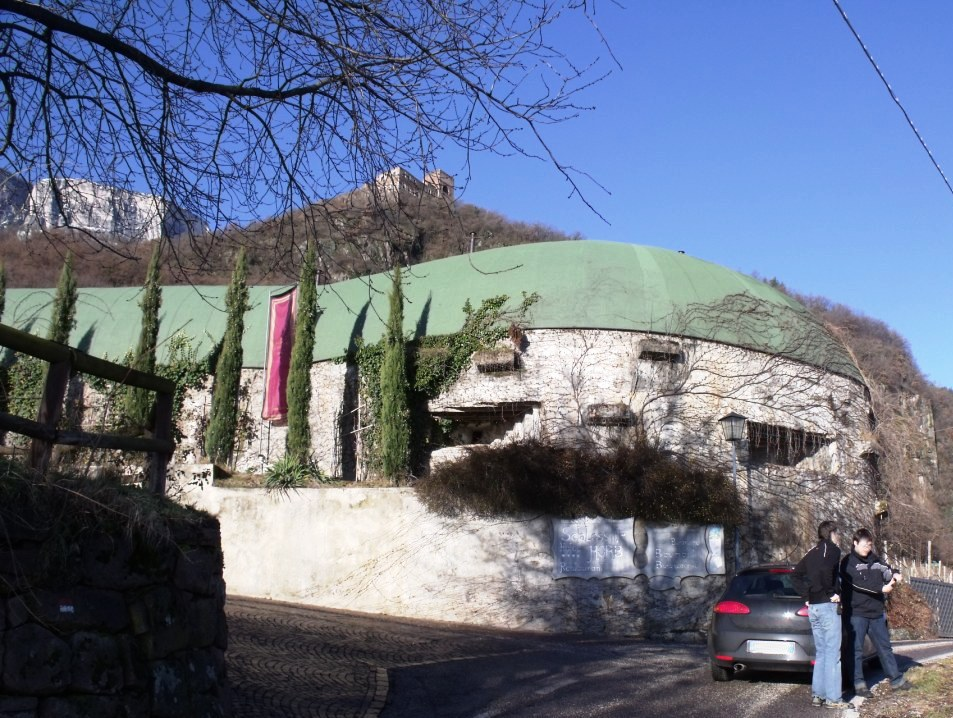 Opera 49 Bolzano